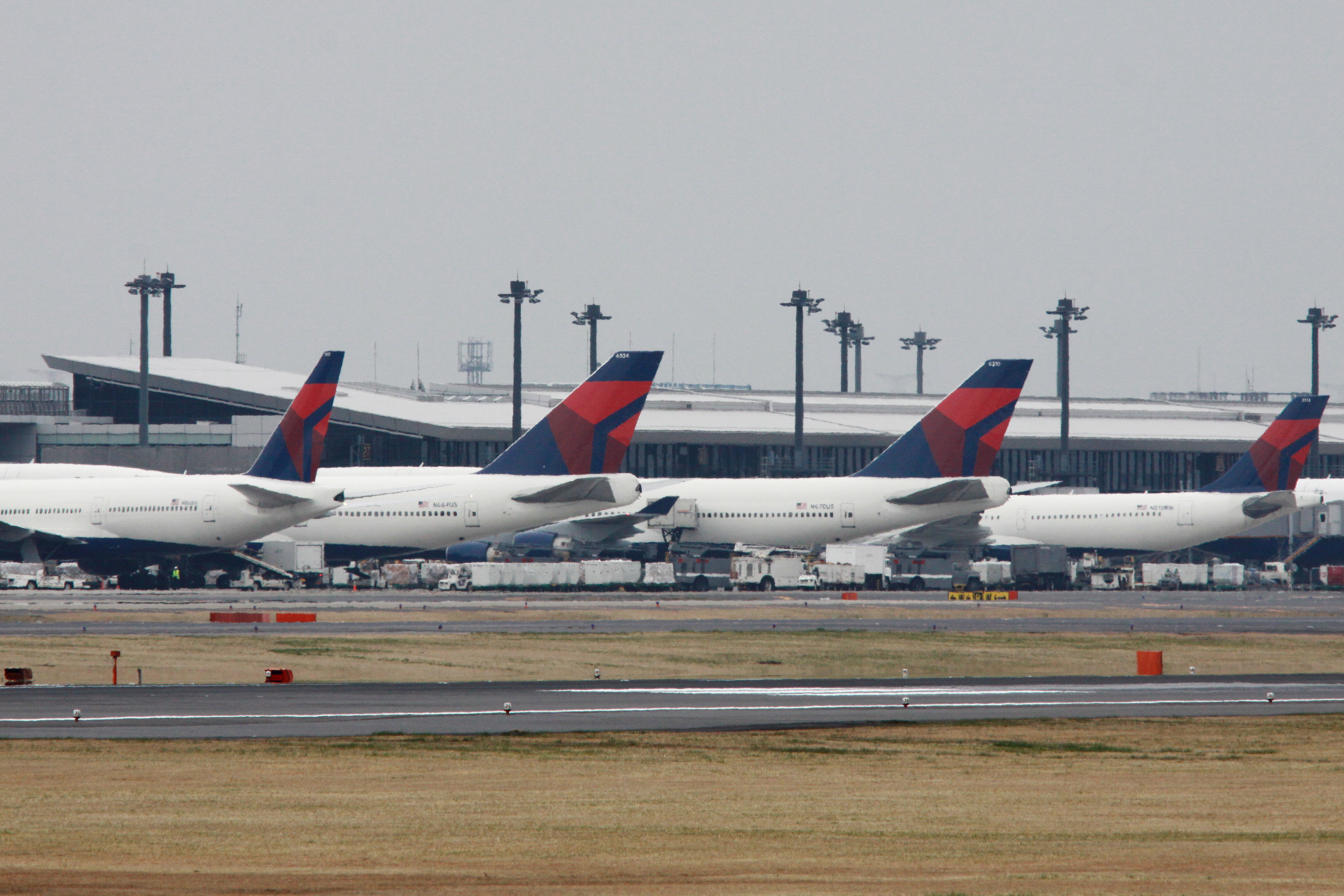 Narita International Airport